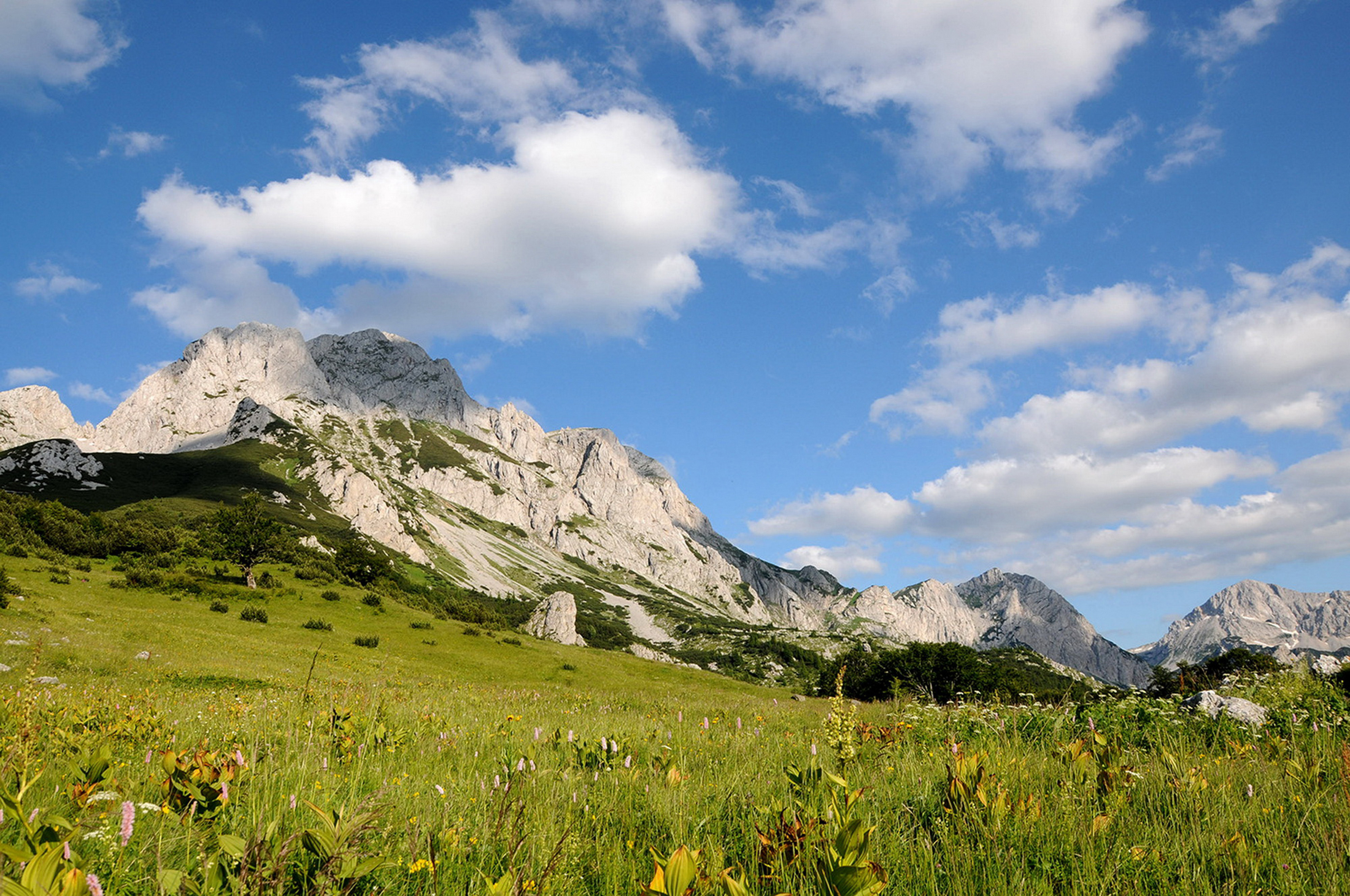 NP Sutjeska planina Maglić Сликава е подигната во рамките на проектот „По трагата на душата 2015“.